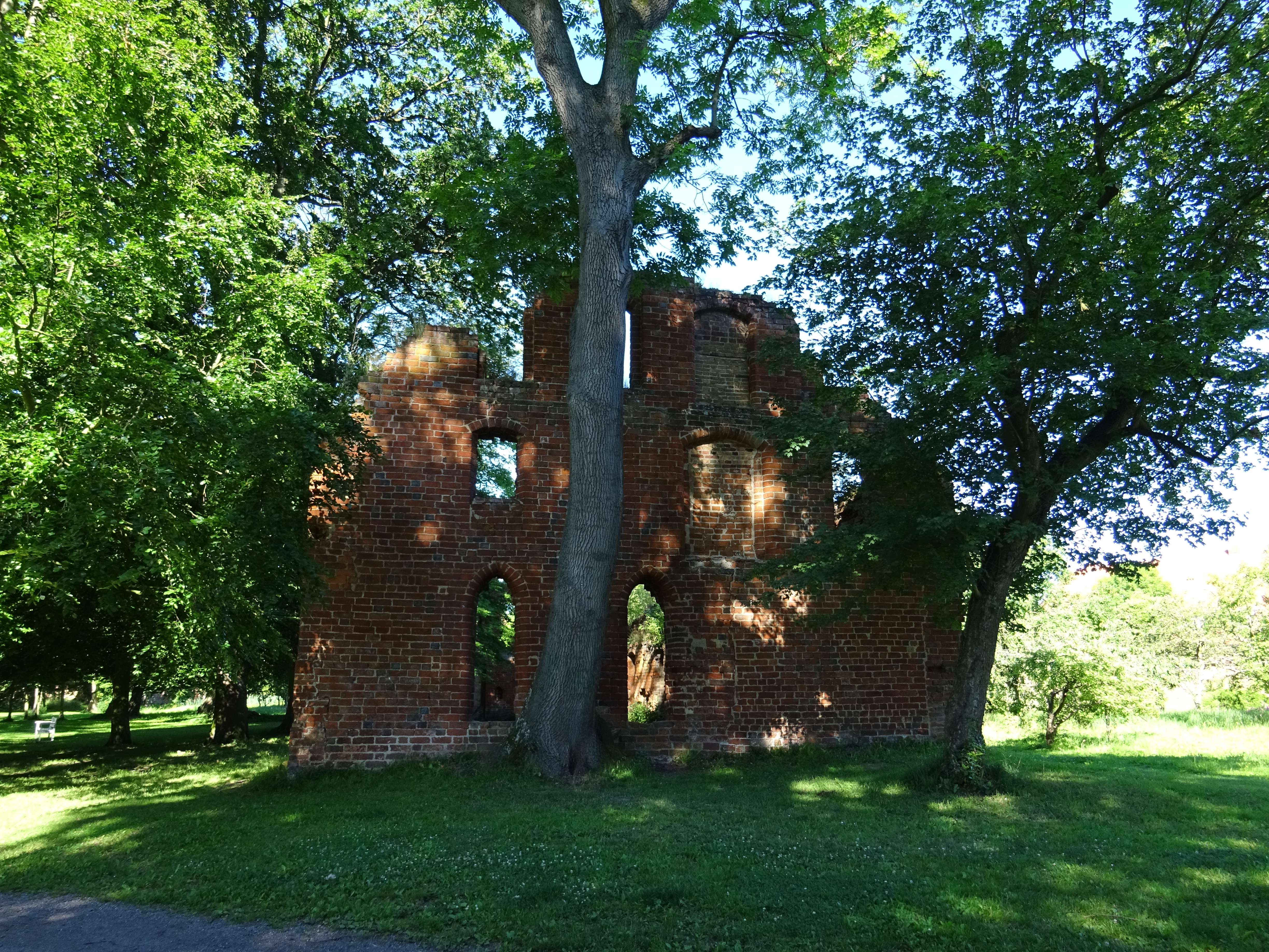 Ruine der Wollscheune (Wolfsscheune, Siechenhaus) auf dem Gelände des Klosters Bad Doberan